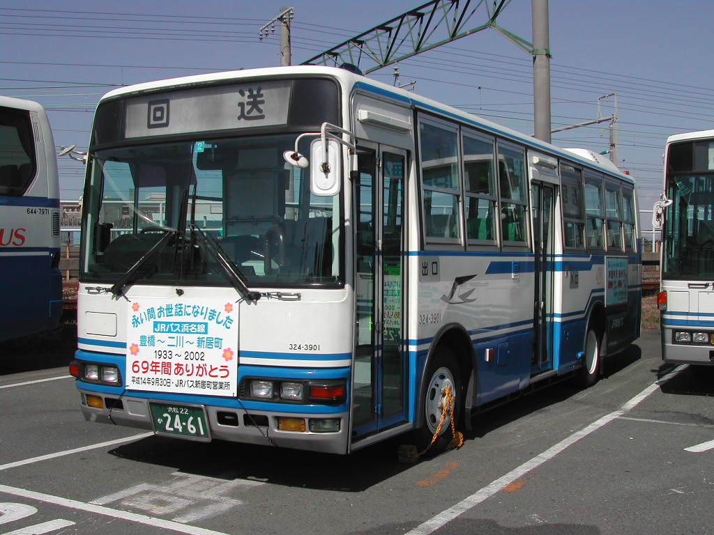 新居町営業所にて